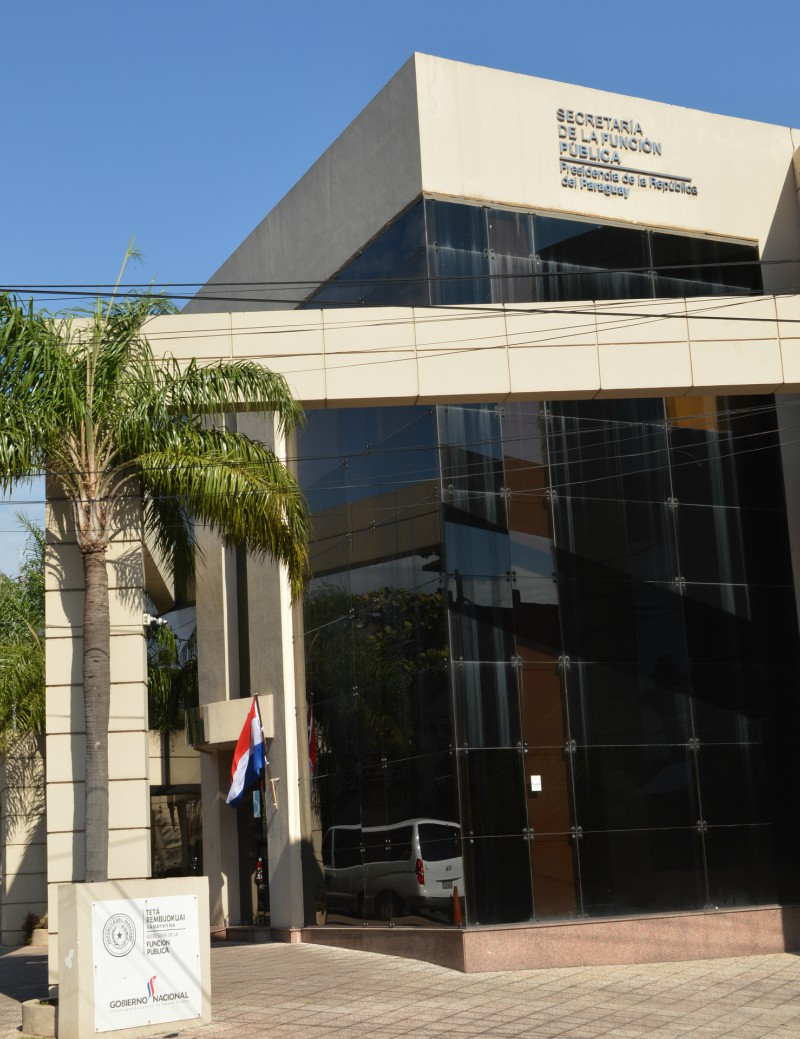 secretaria de la función publica